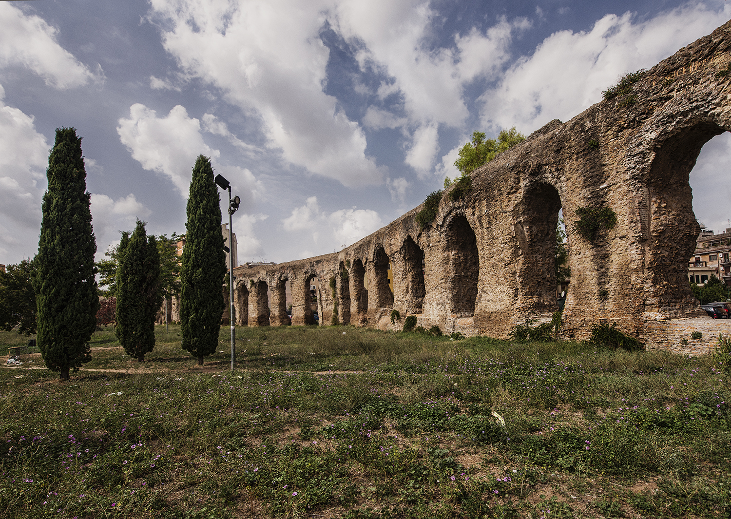 Acquedotto Alessandrino This is a photo of a monument which is part of cultural heritage of Italy.